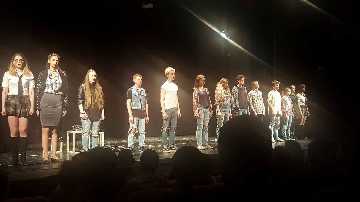 Glumačka ekipa predstave Mi deca sa stanice Zoo